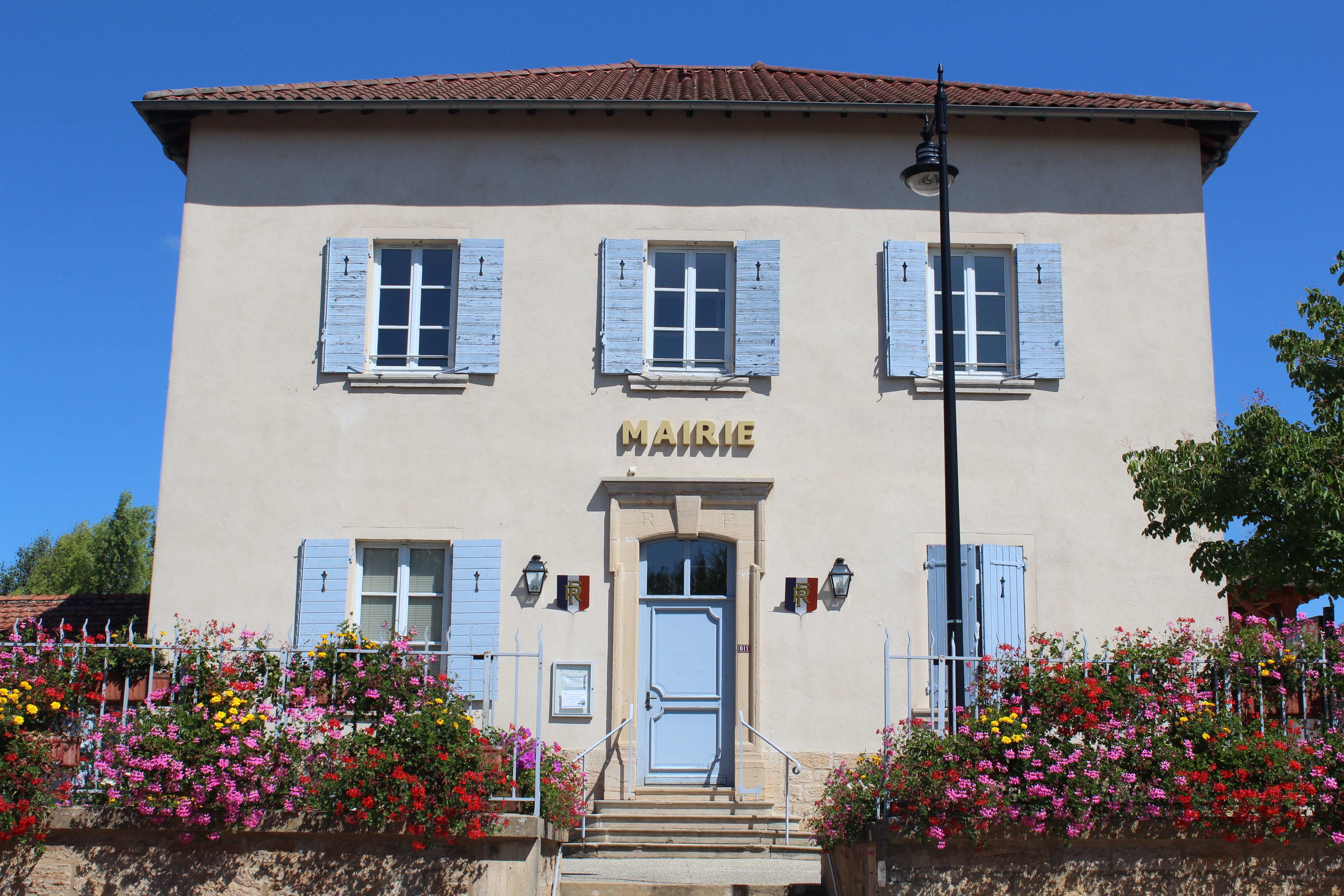 Mairie de Francheleins.